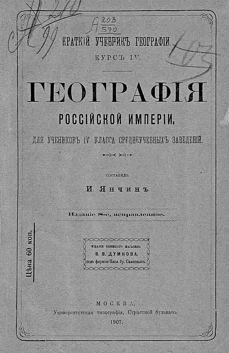 География Российской империи. Автор - Иван Васильевич Янчин (1839—1889) — российский педагог; автор ряда учебников.